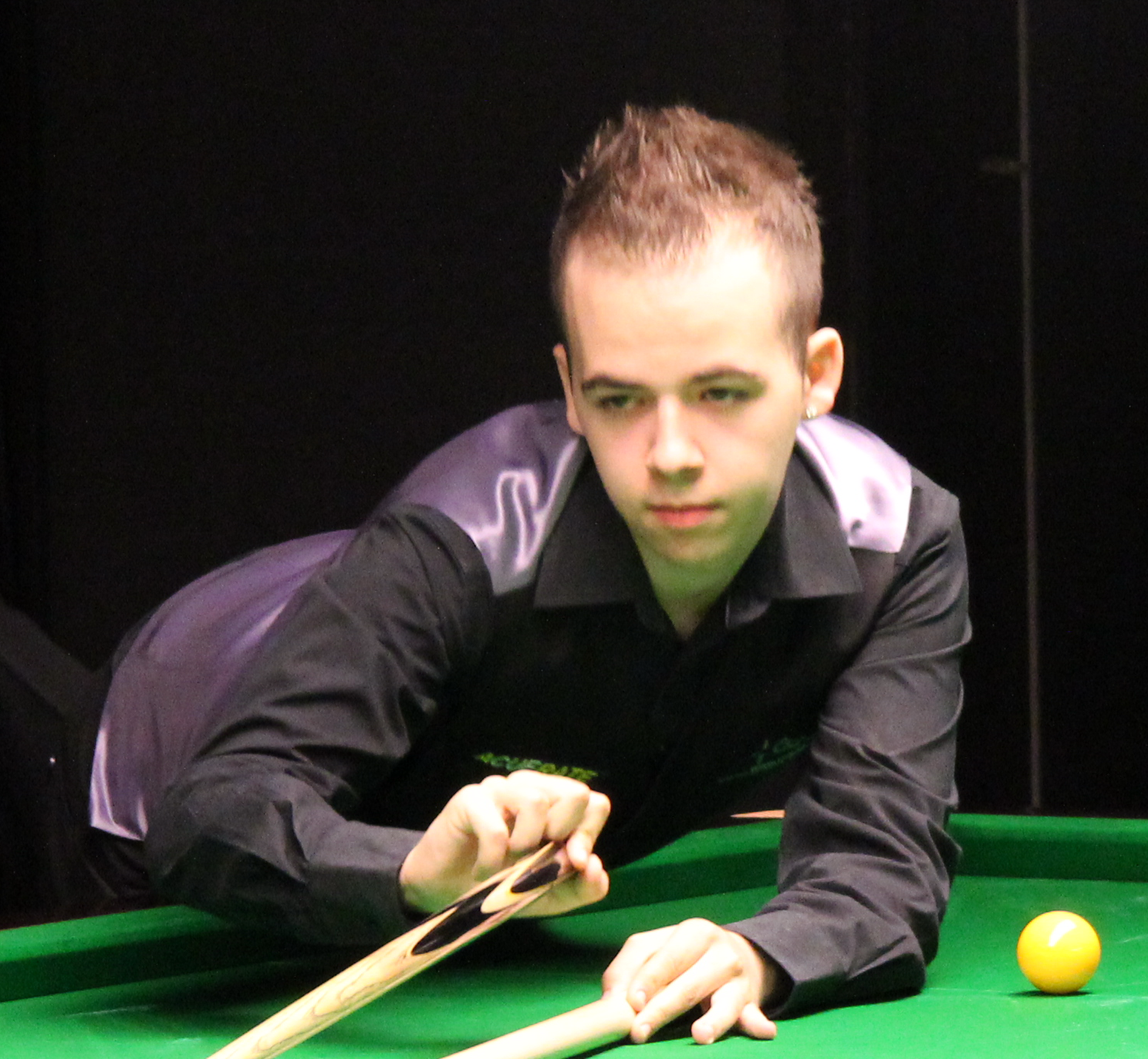 Luca Brecel beim Paul Hunter Classic 2011